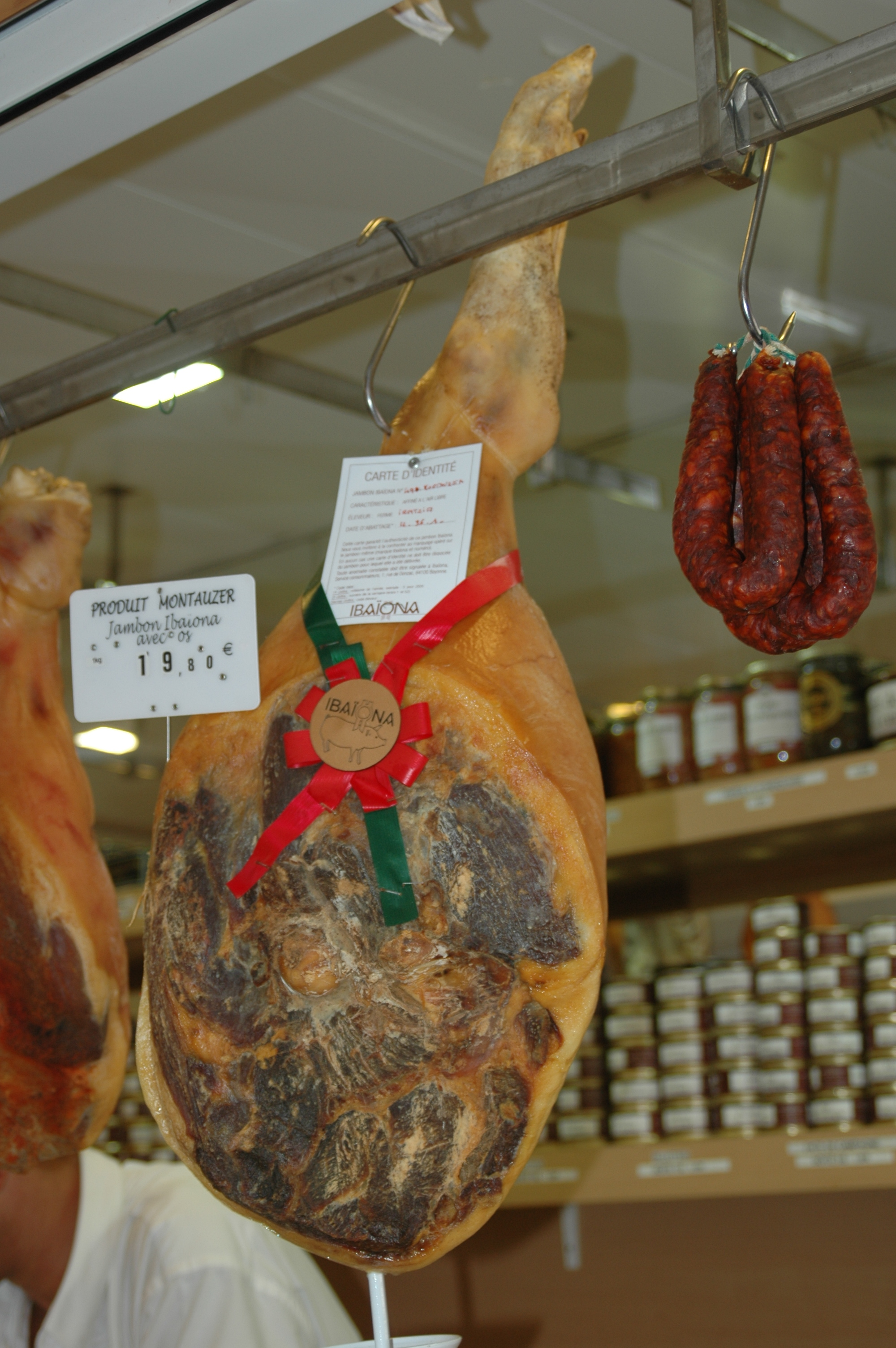 Marché de Biarritz, jambon de Bayonne. Photo prise le 06/08/06 par Harrieta171